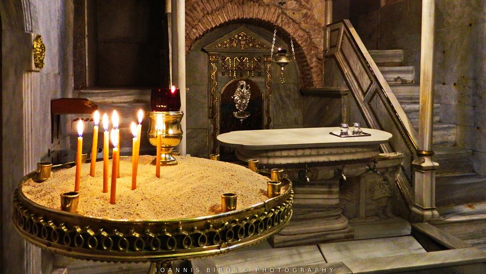 Ζωοδόχος Πηγή του Μπαλουκλή Αγιασμα εσωτερικος χωρος του Αγιασματος